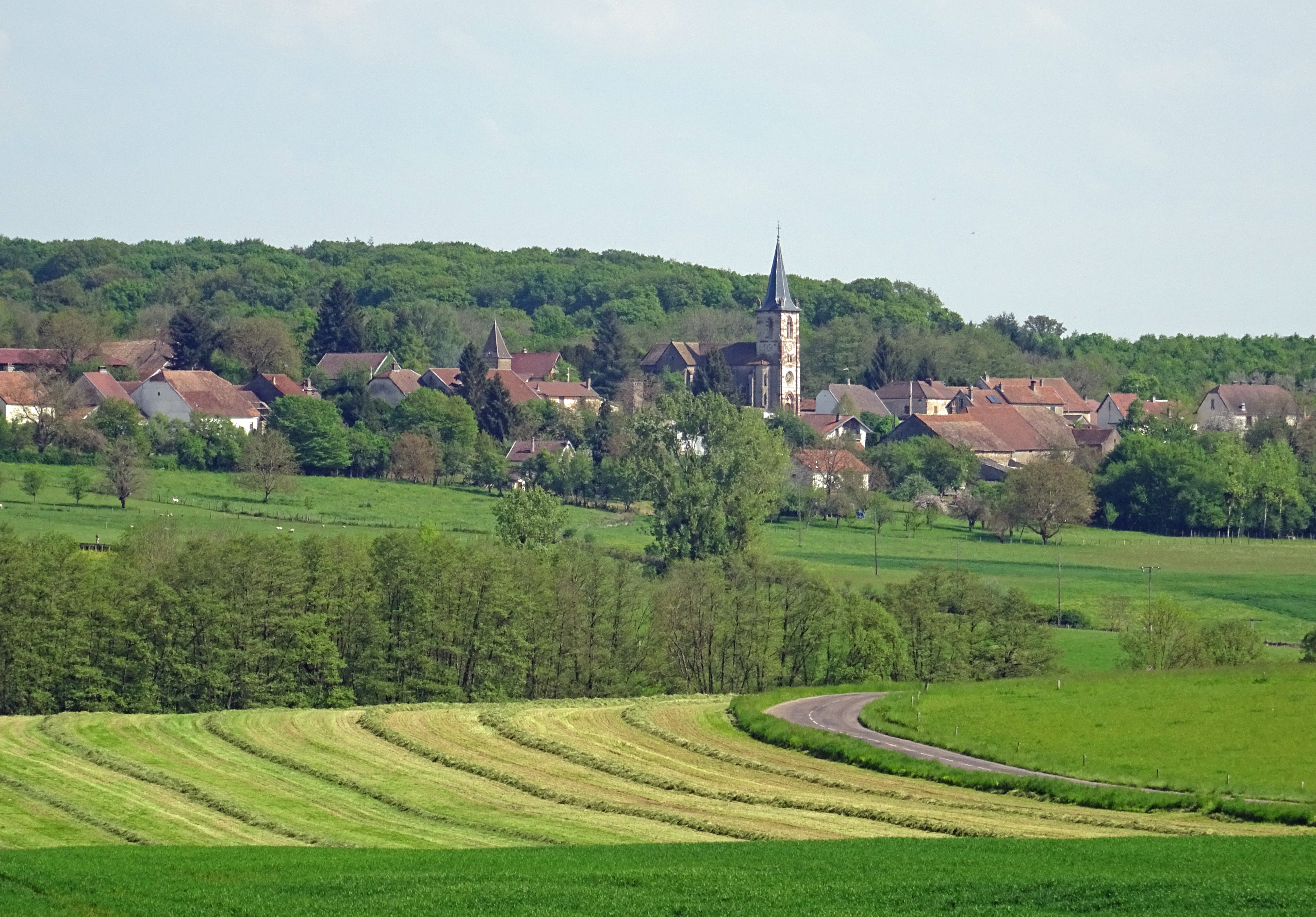 Vue génrale de Châtenois (Haute-Saône).